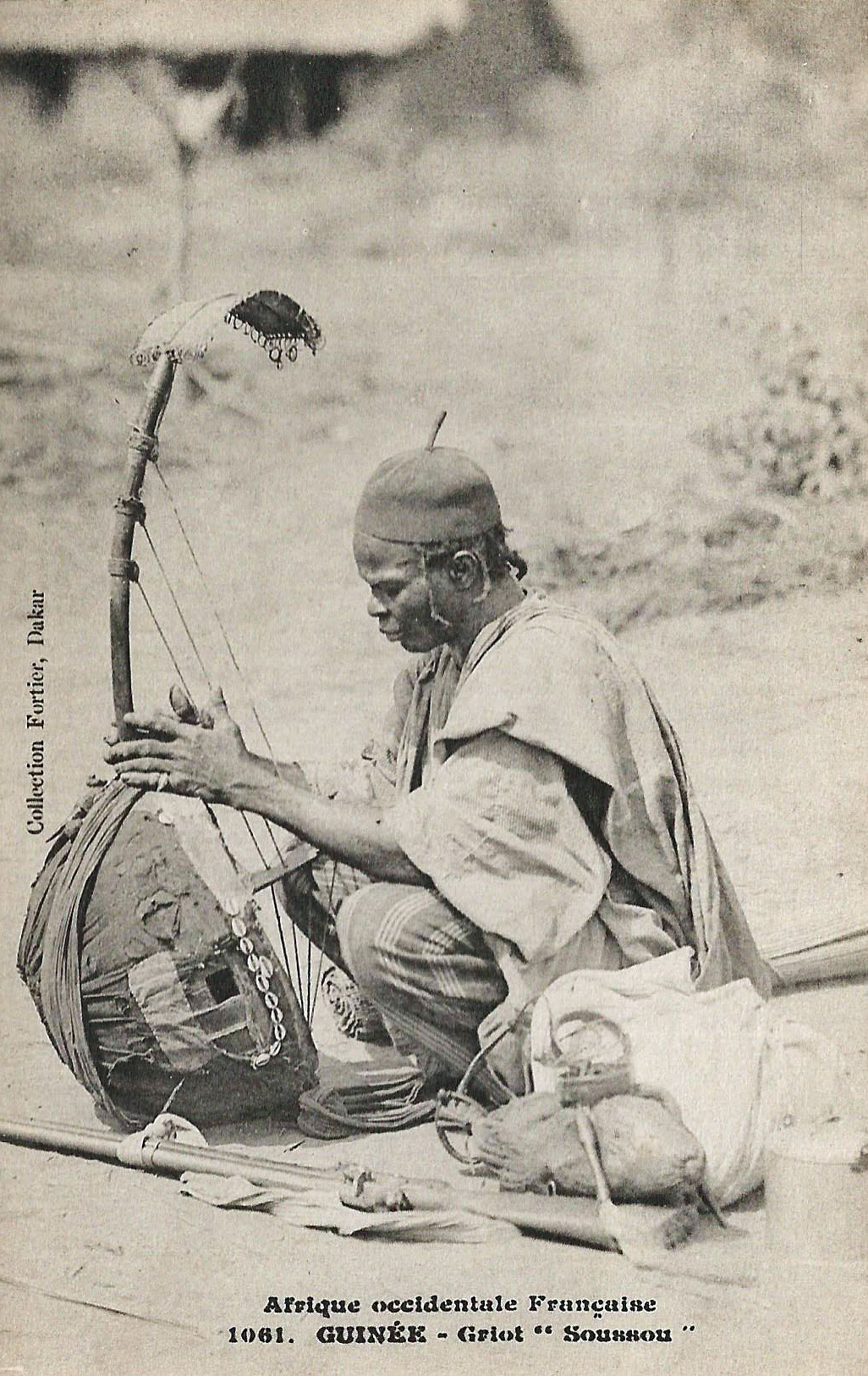 François-Edmond Fortier, Griot Soussou. Afrique Occidentale Française. Guinée